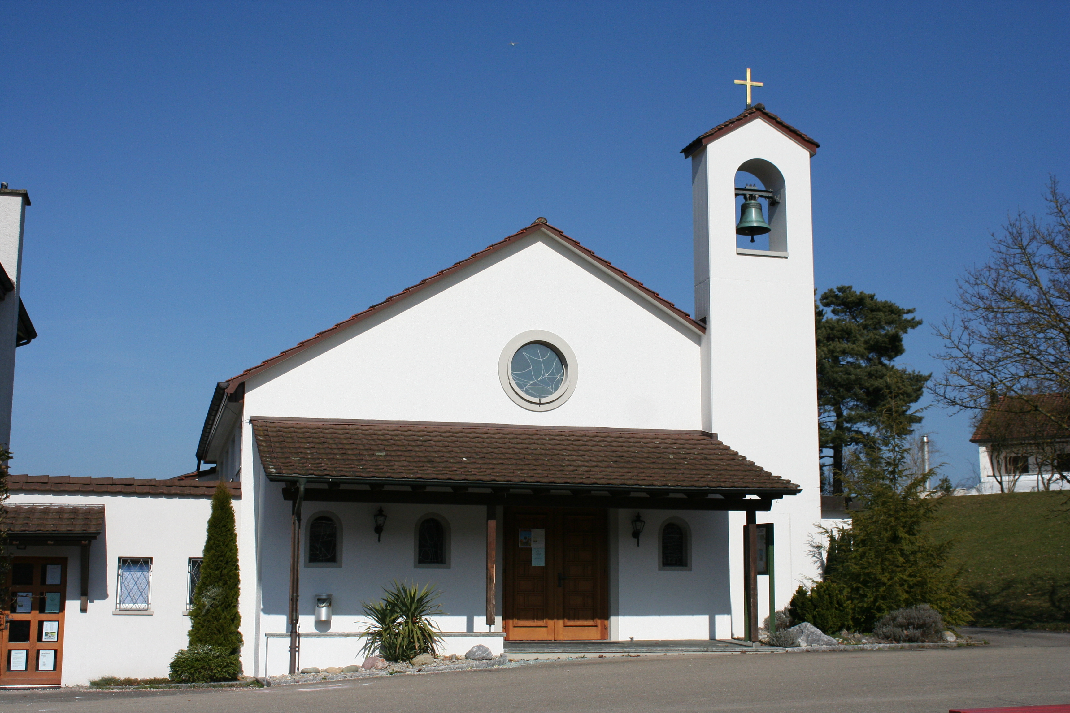 Römisch-katholische Kirche St. Josef Rickenbach-Sulz